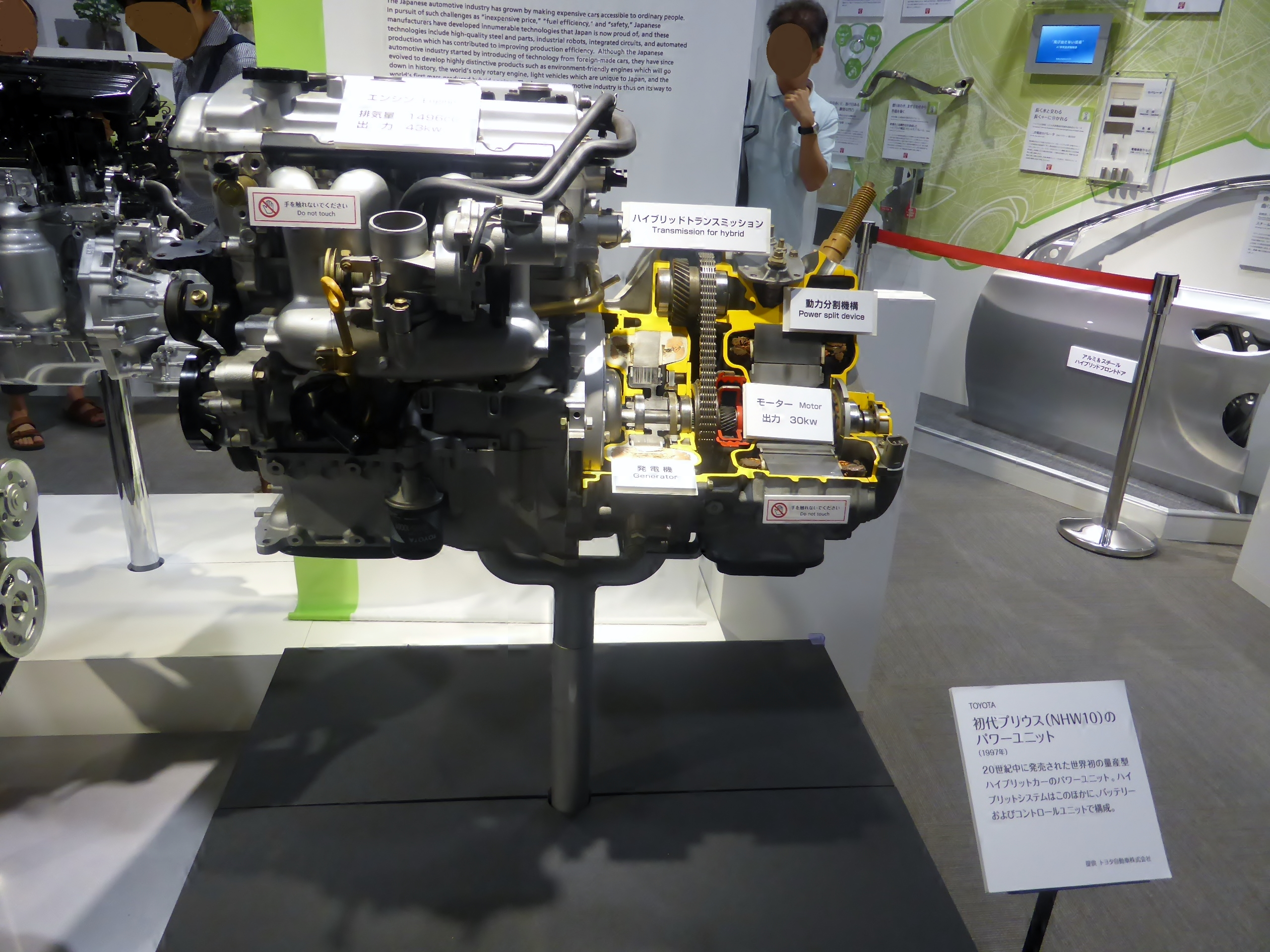 初代トヨタ・プリウスのパワーユニットを撮影。